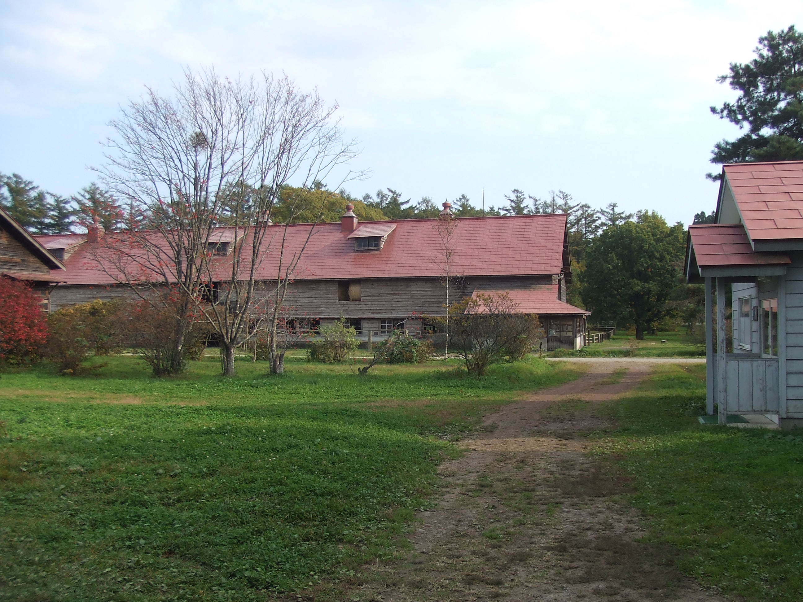 小岩井農場